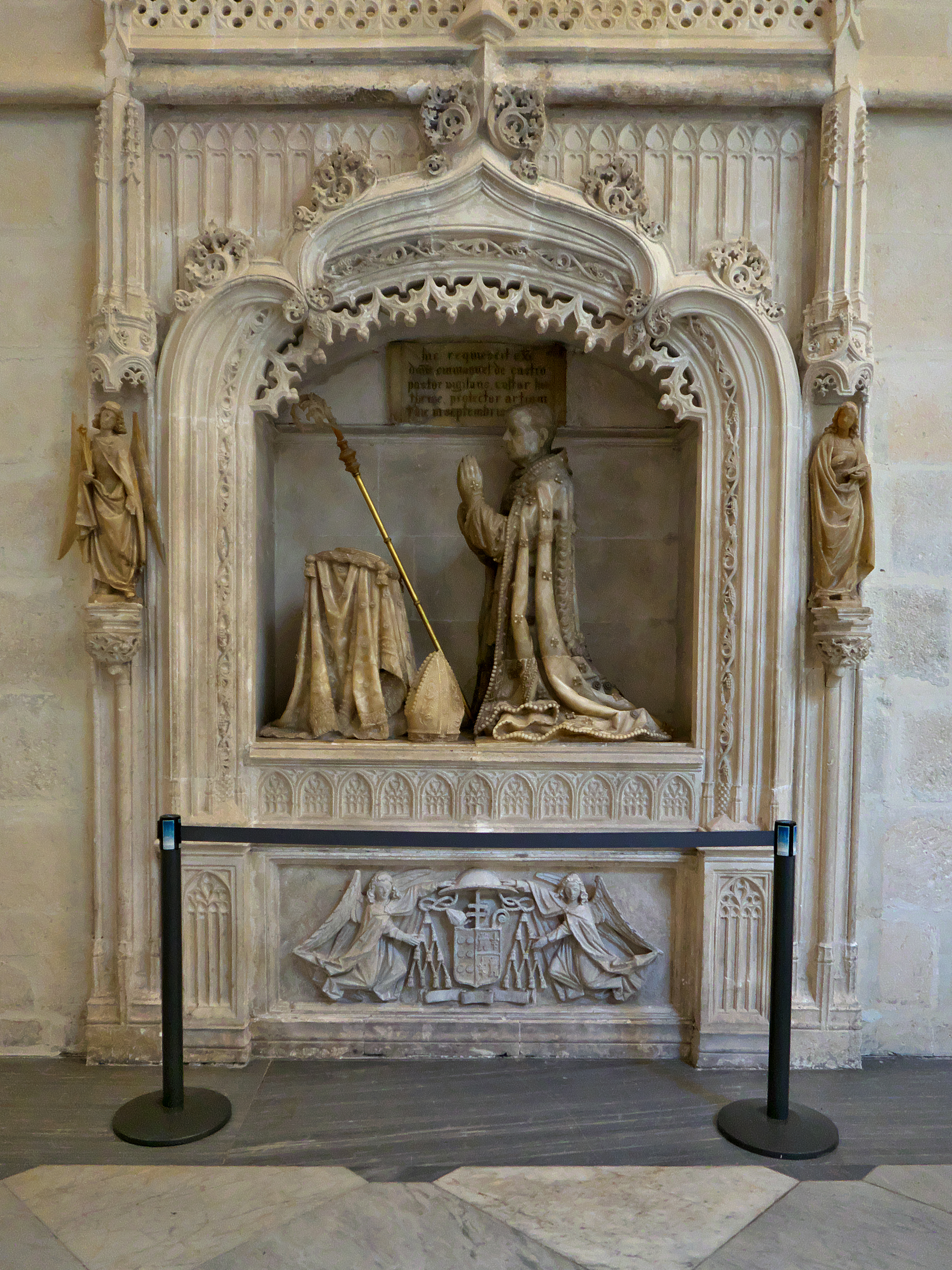 Nave de la Epístola. Una obra de Andrés Martínez Abelenda.